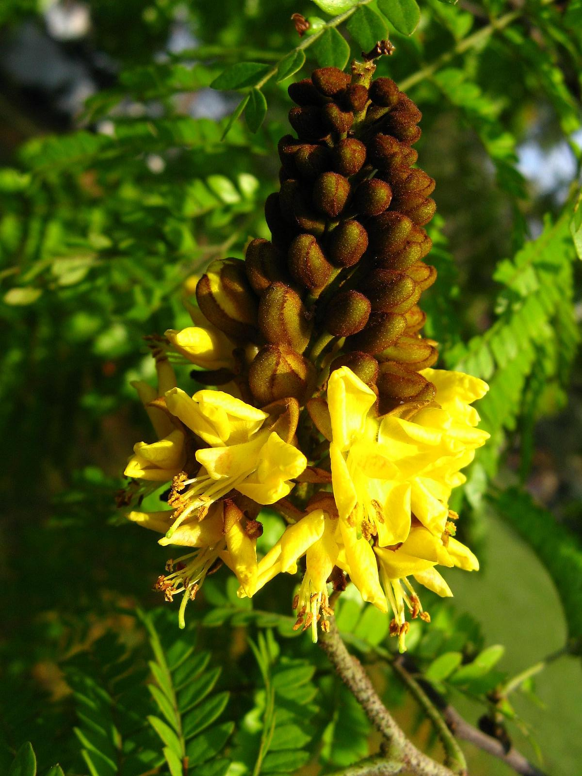 Sibipiruna (Caesalpinia pluviosa var. peltophoroides) Sao paulo brasil